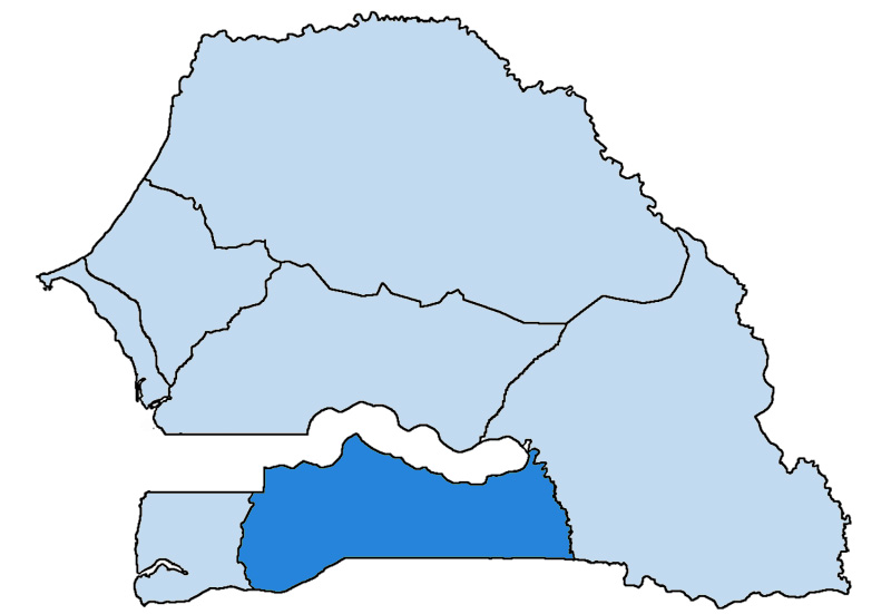 Mappa della diocesi cattolica di Kolda, in Senegal. Anno 2009.